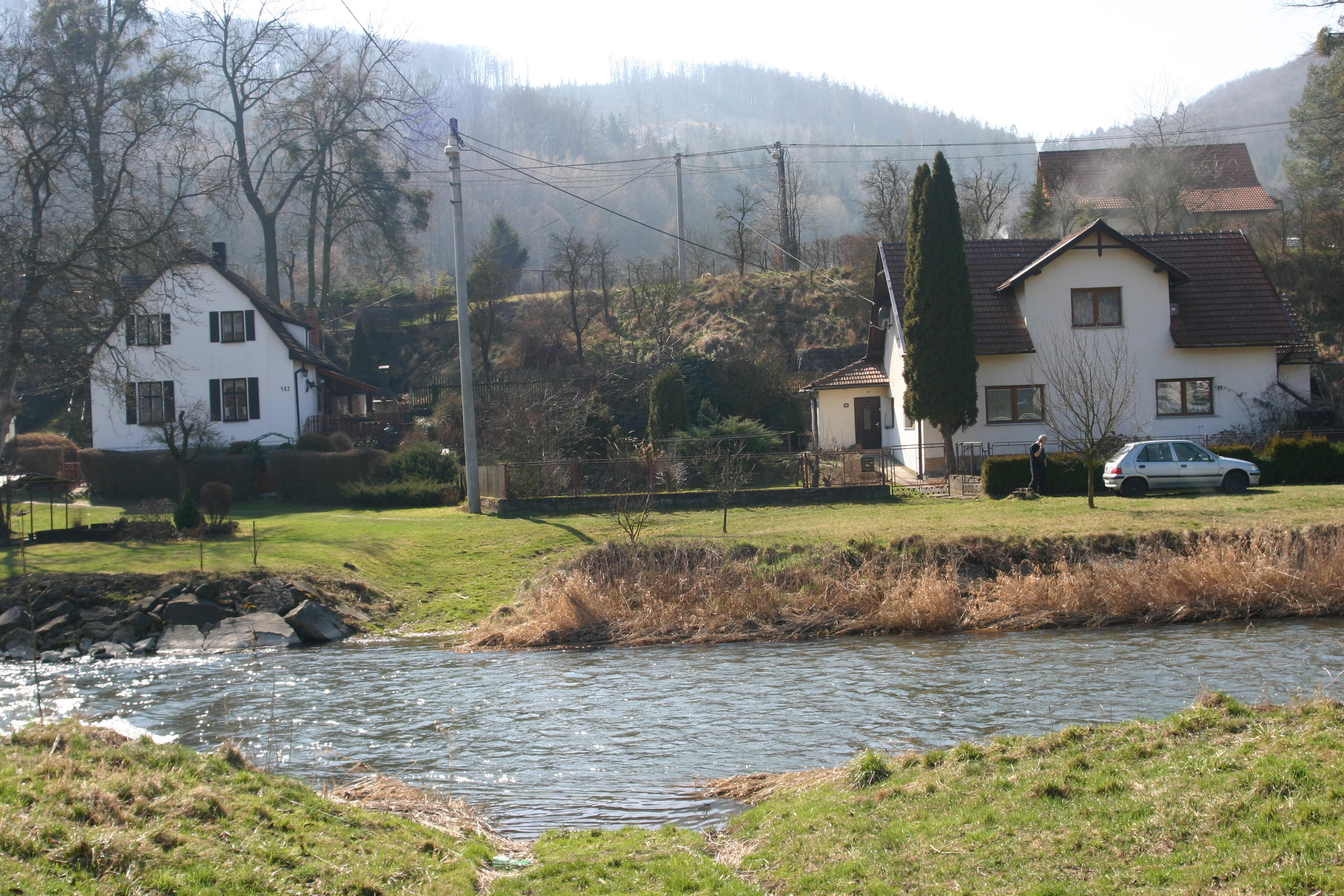 Dva obytné domy v obci Loučky